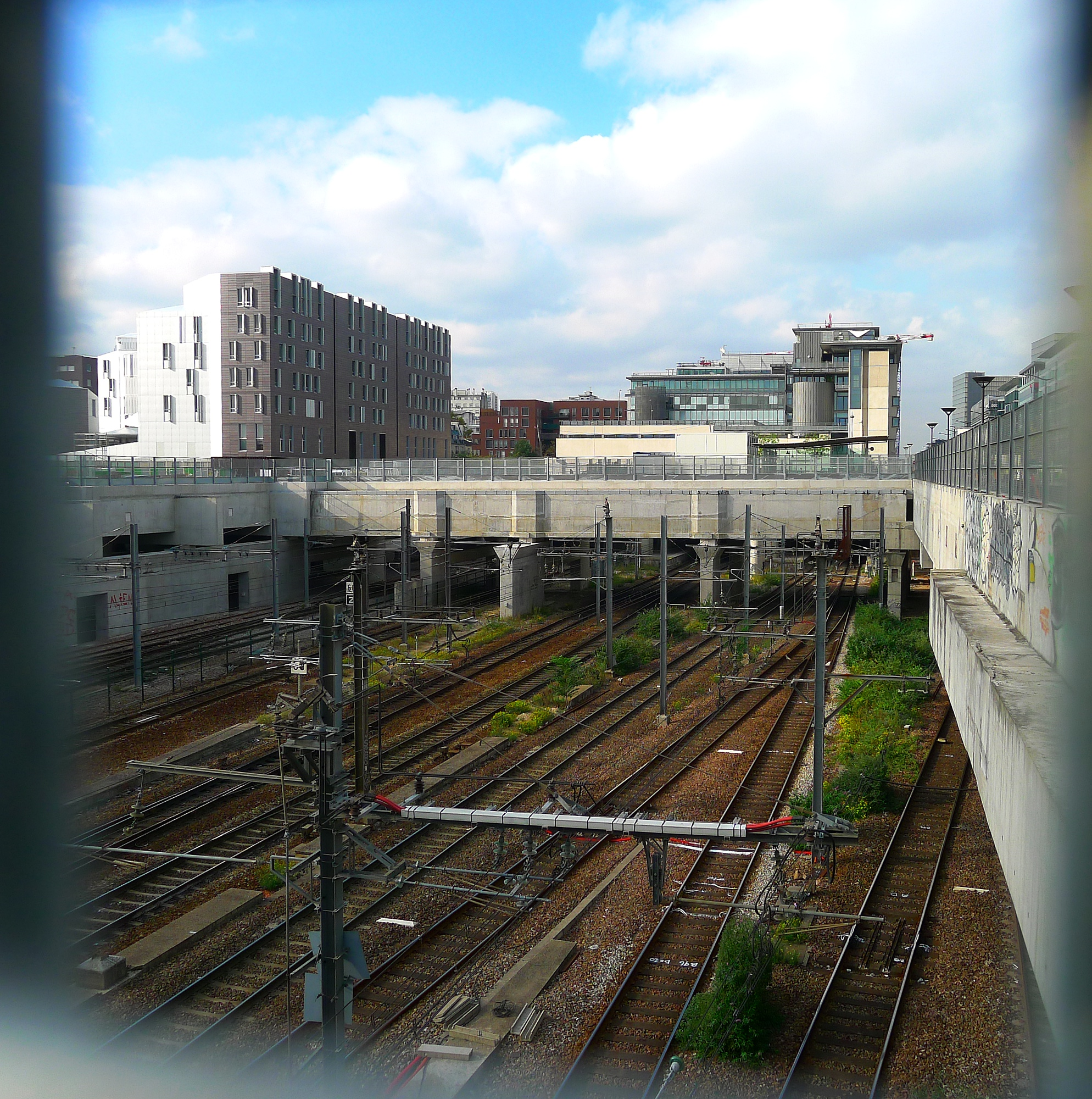 Avenue de France (couverture des voies de la gare d'Austerlitz) - Paris XIII